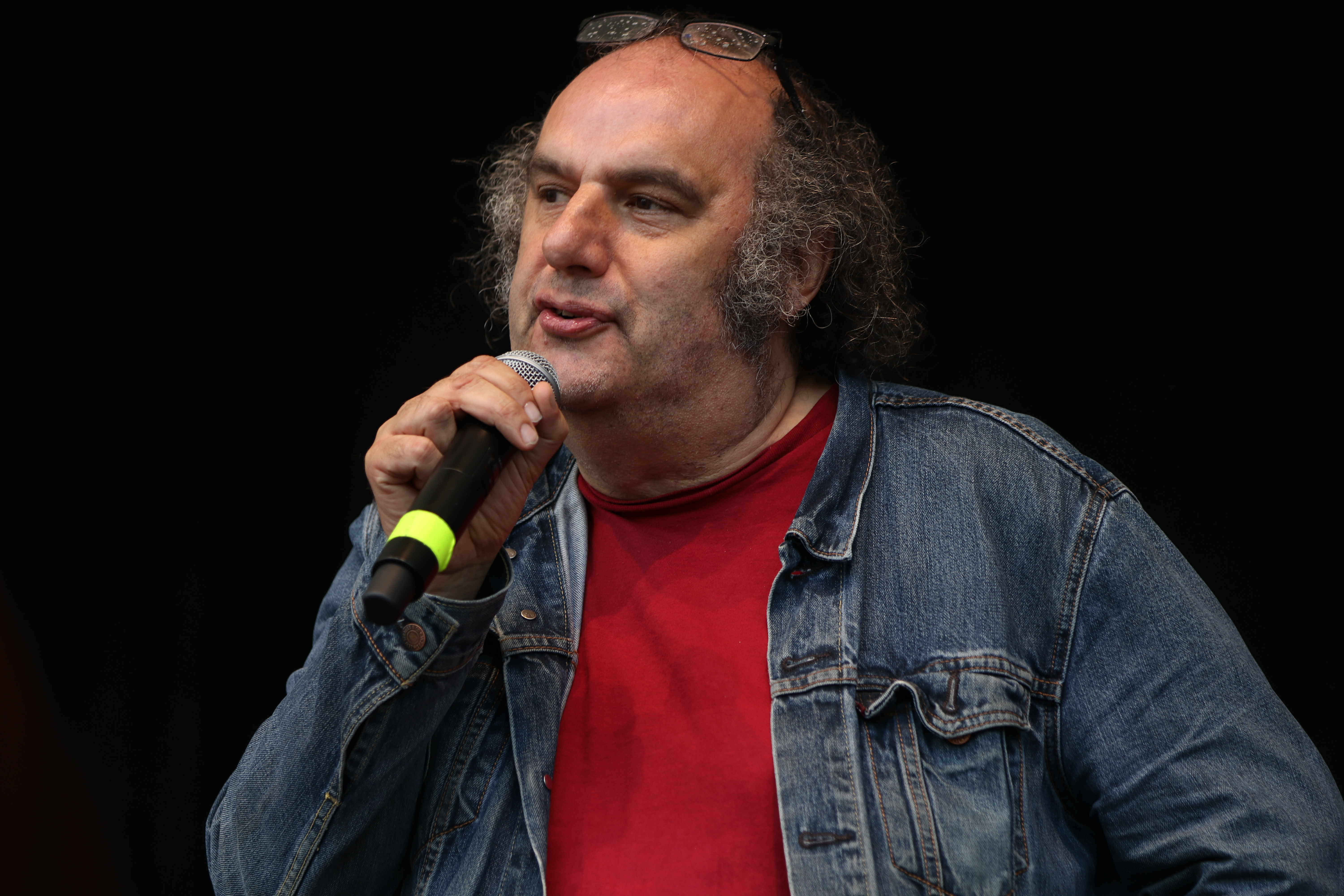 Ausgehetzt, Demonstration in München am 22. Juli 2018 gegen den Rechtsruck in der bayerischen Politik